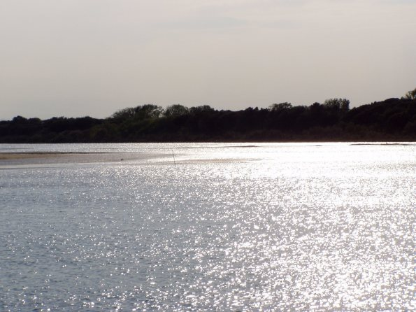 Autore: Alberto Vigani; Descrizione: foto dall'imboccatura della Laguna del Mort; foto personale scattata il 2 agosto del 2006; Licenza CC; Proprietà: Alberto Vigani.